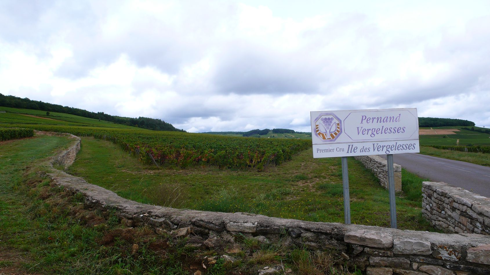 Pernand-Vergelesses, Côte-d'Or, Burgund; Ile des Vergelesses